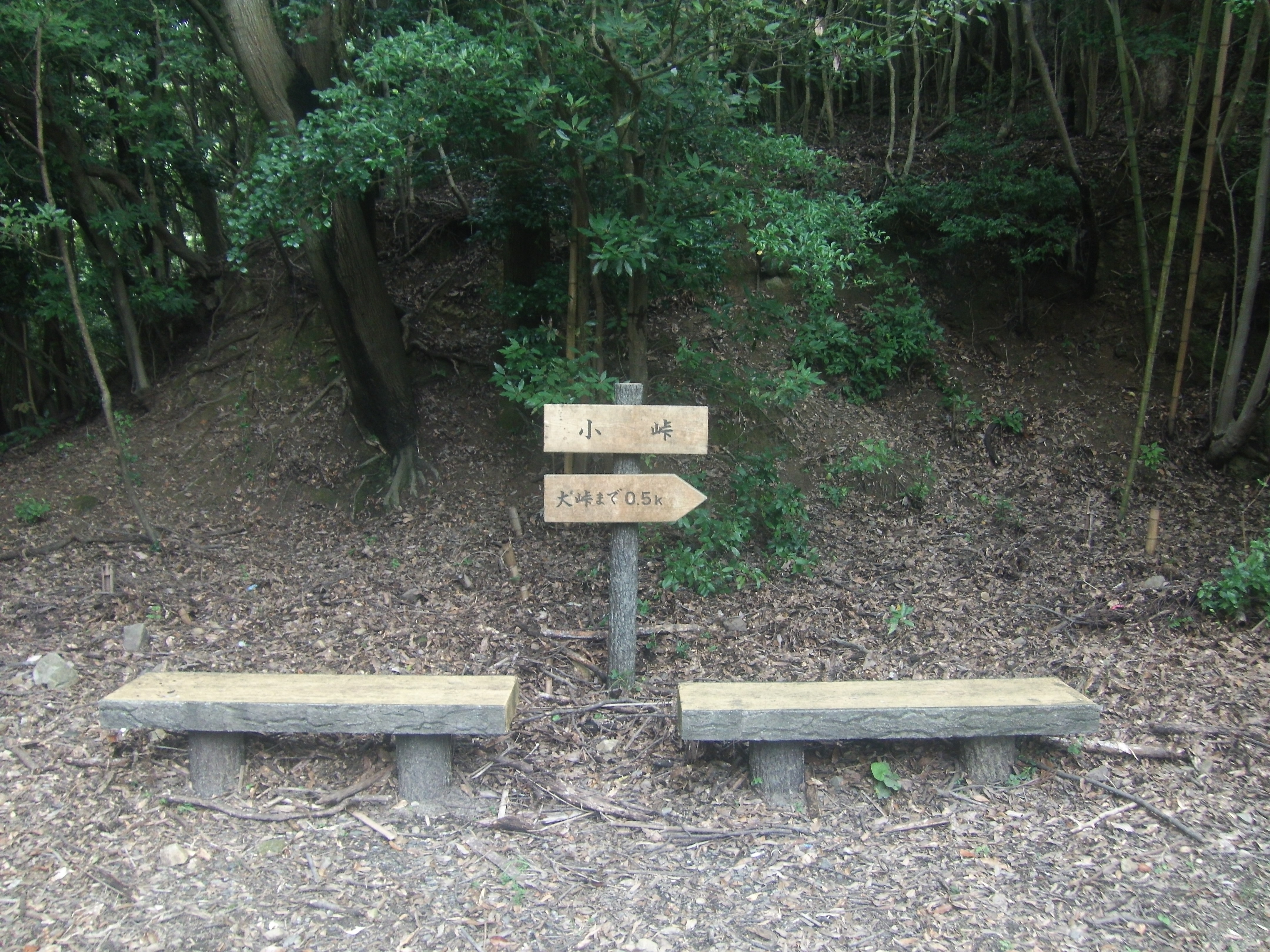 熊野古道・紀伊路の小峠、鹿ケ瀬峠（大峠）に続くものから小峠と呼ばれる、広川町と日高町の境界になる